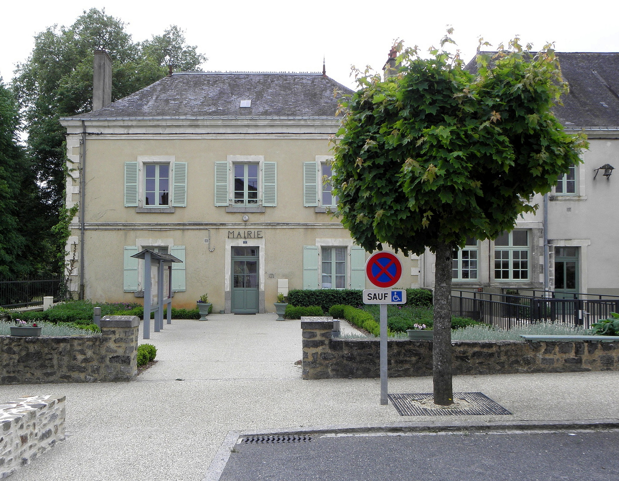 Mairie de Chémeré-le-Roi (53).